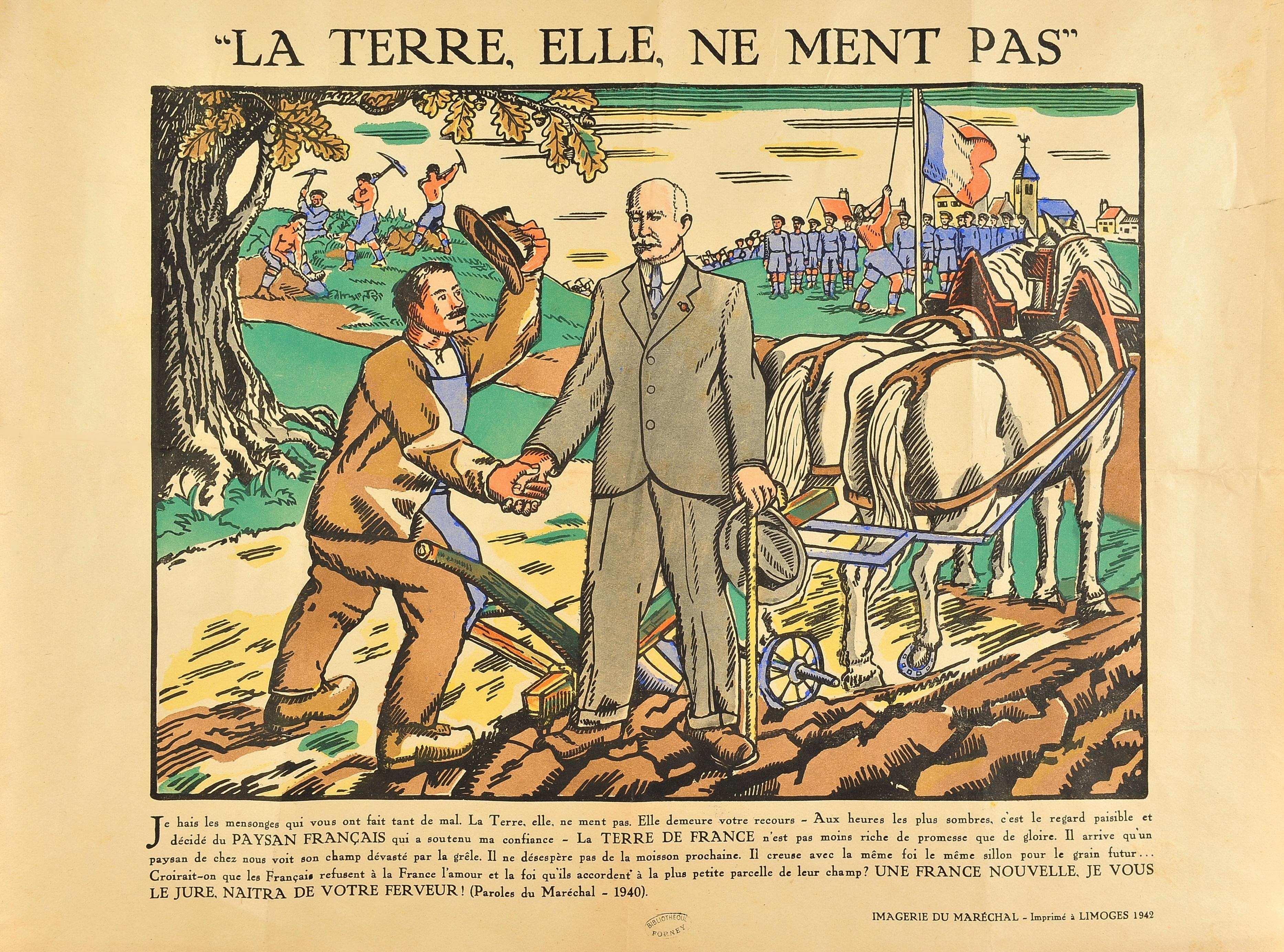 Image de propagande vichyste exaltant la vie rurale. Estampe en couleurs, 37 x 47 cm. Limoges, Imagerie du Maréchal, 1942.